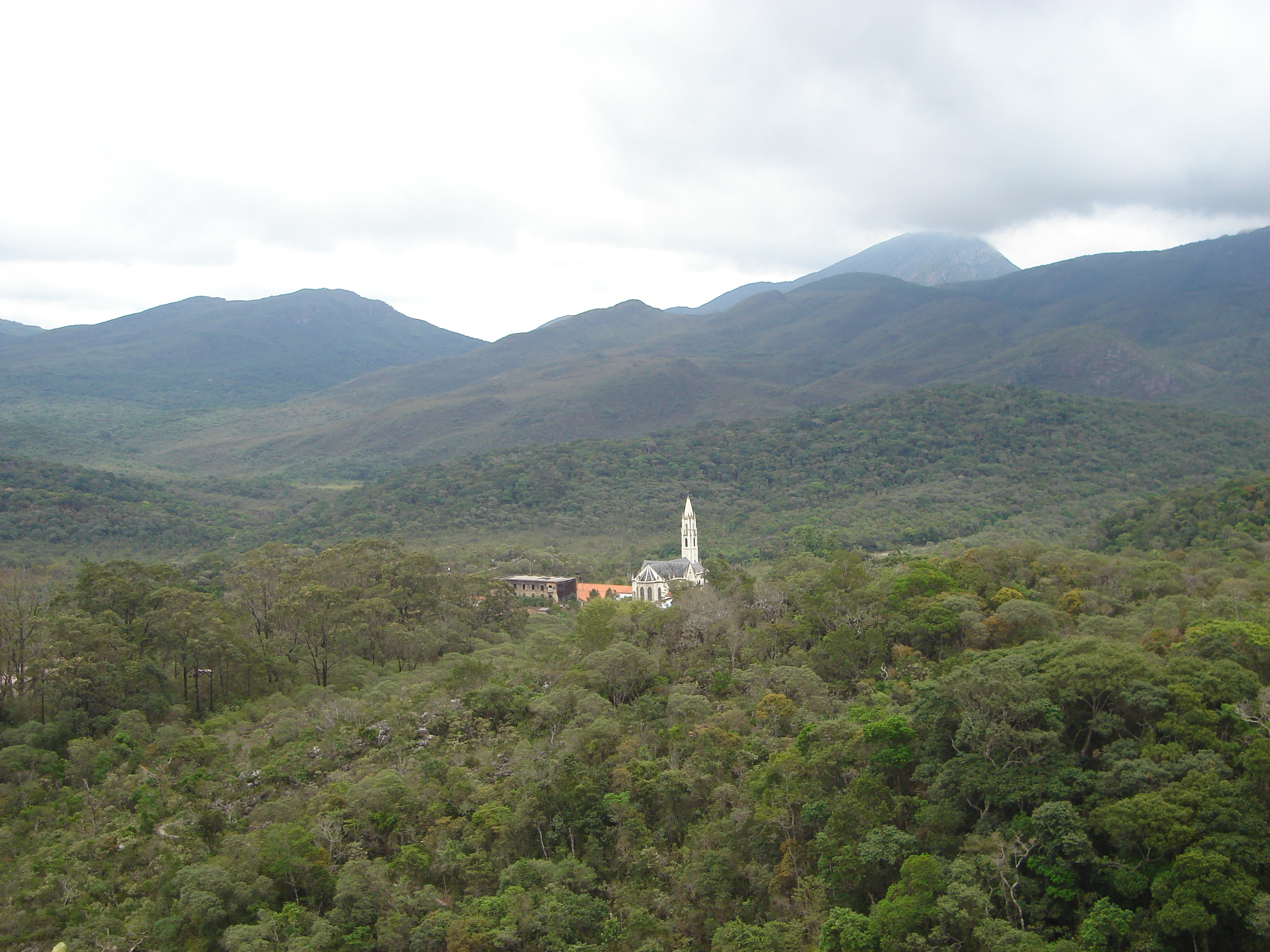 Serra do Caraca